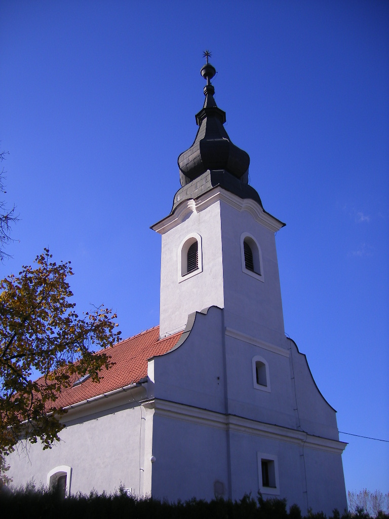 Csilizradvány - református templom